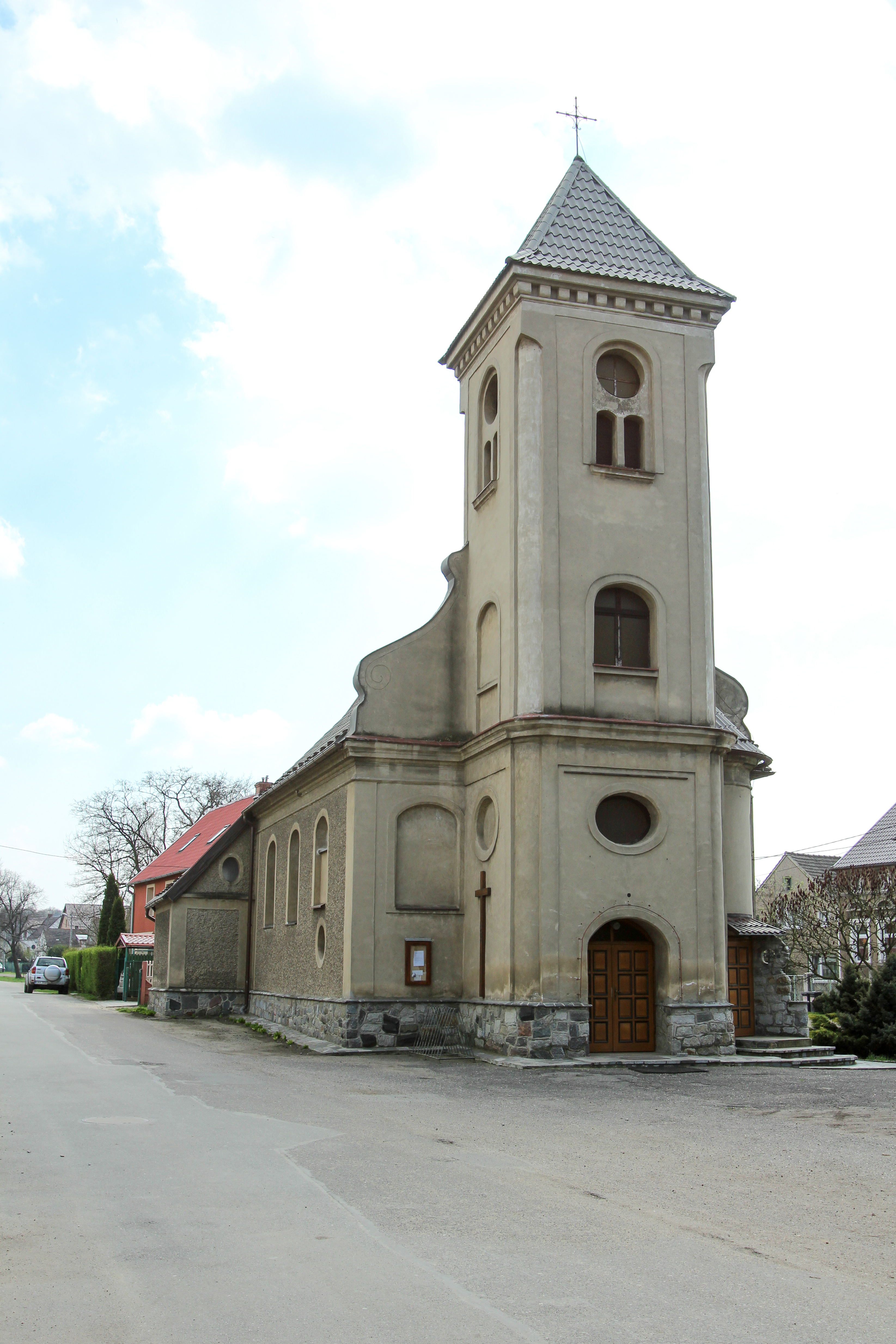 Kubice – wieś w Polsce położona w województwie opolskim, w powiecie nyskim, w gminie Nysa.